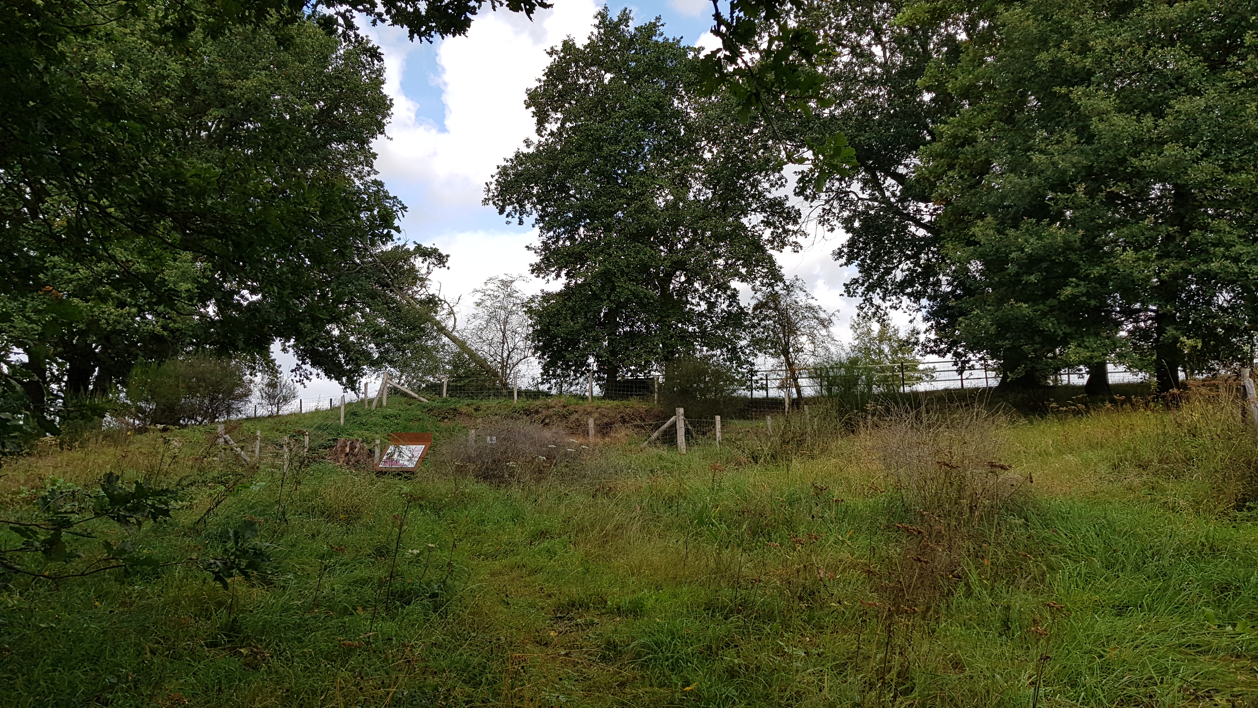 Groeve Banholtergrubbe, Banholt, Nederland